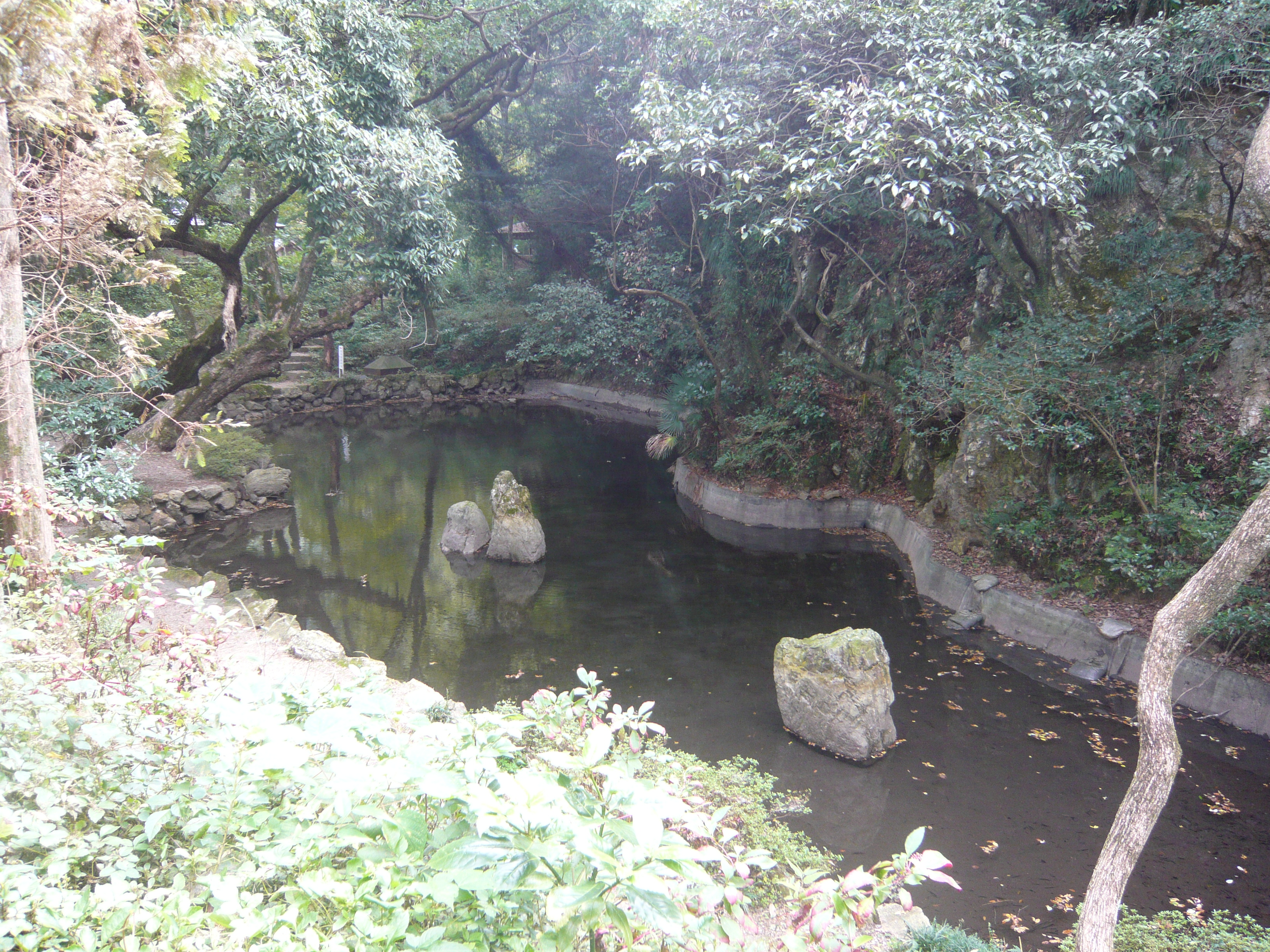 Mitarashi Pond (Gifu)（御手洗池 (岐阜市)）,Gifu,Gifu,Japan（岐阜県岐阜市）で撮影。